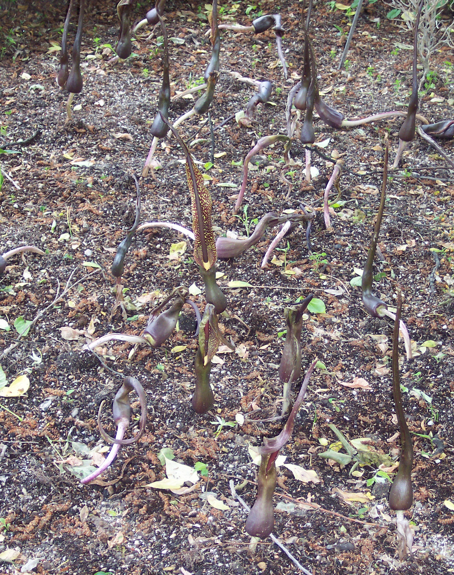 Sauromatum venosum. Real Jardín Botánico de Madrid.